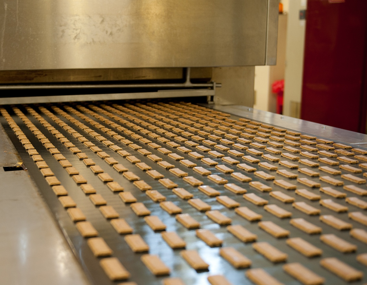 Backstraße für Aachener Printen in der Aachener Printen- und Schokoladenfabrik Henry Lambertz GmbH & Co. KG